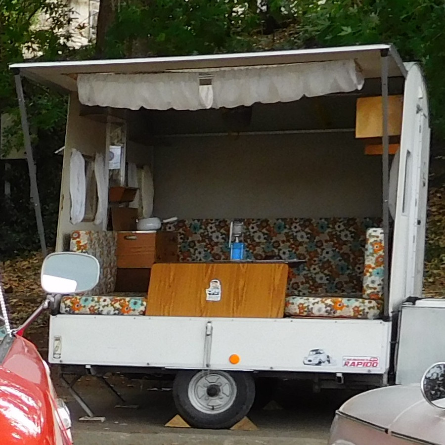 Rétro-caravaning : petite caravane Rapido.